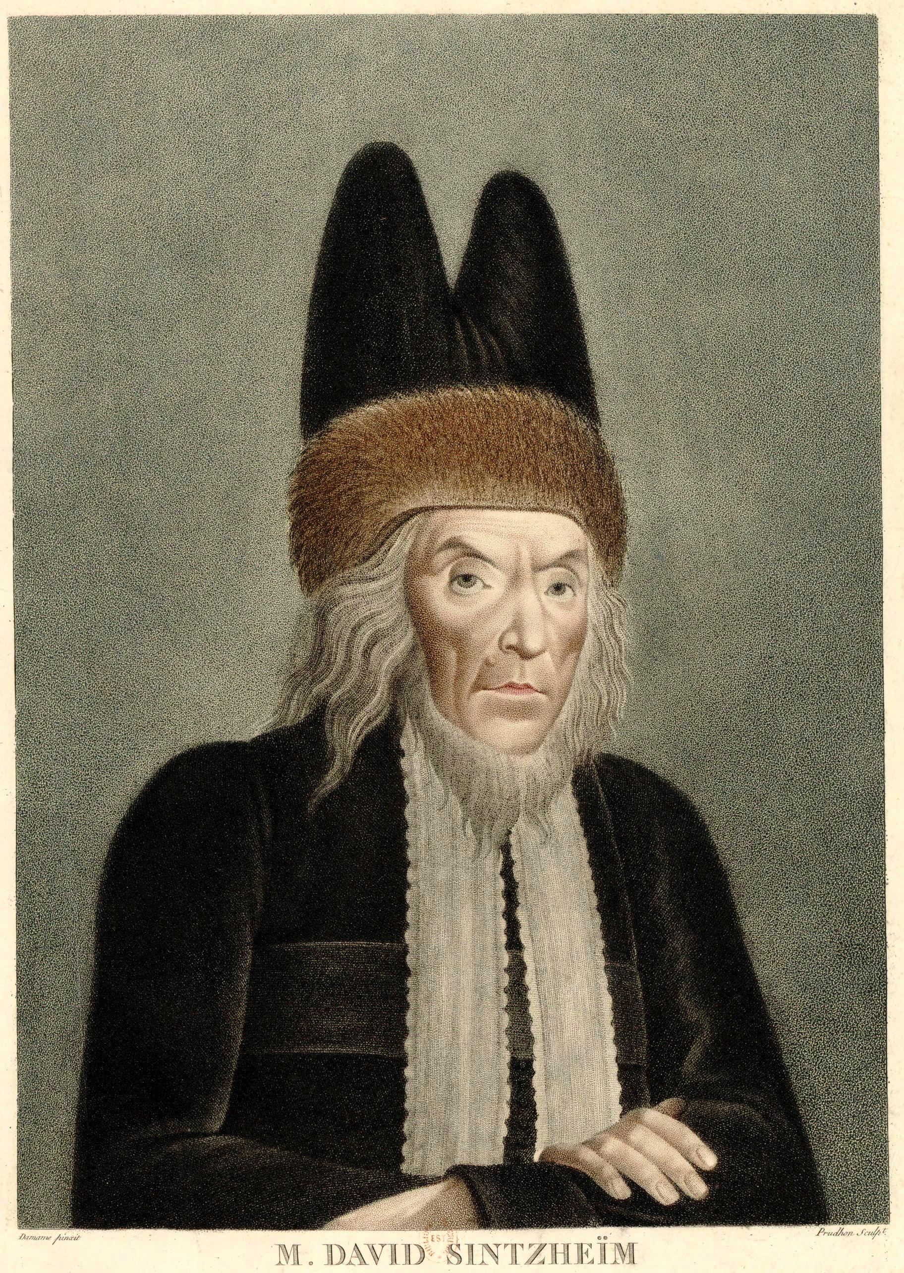 Portrait de David Sintzheim, né en 1745 à Trèves en Allemagne et mort à Paris en 1812. chef du grand Sanhedrin, premier g.d rabbin du Consistoire central, en buste, de 3/4 dirigé à droite : [estampe]